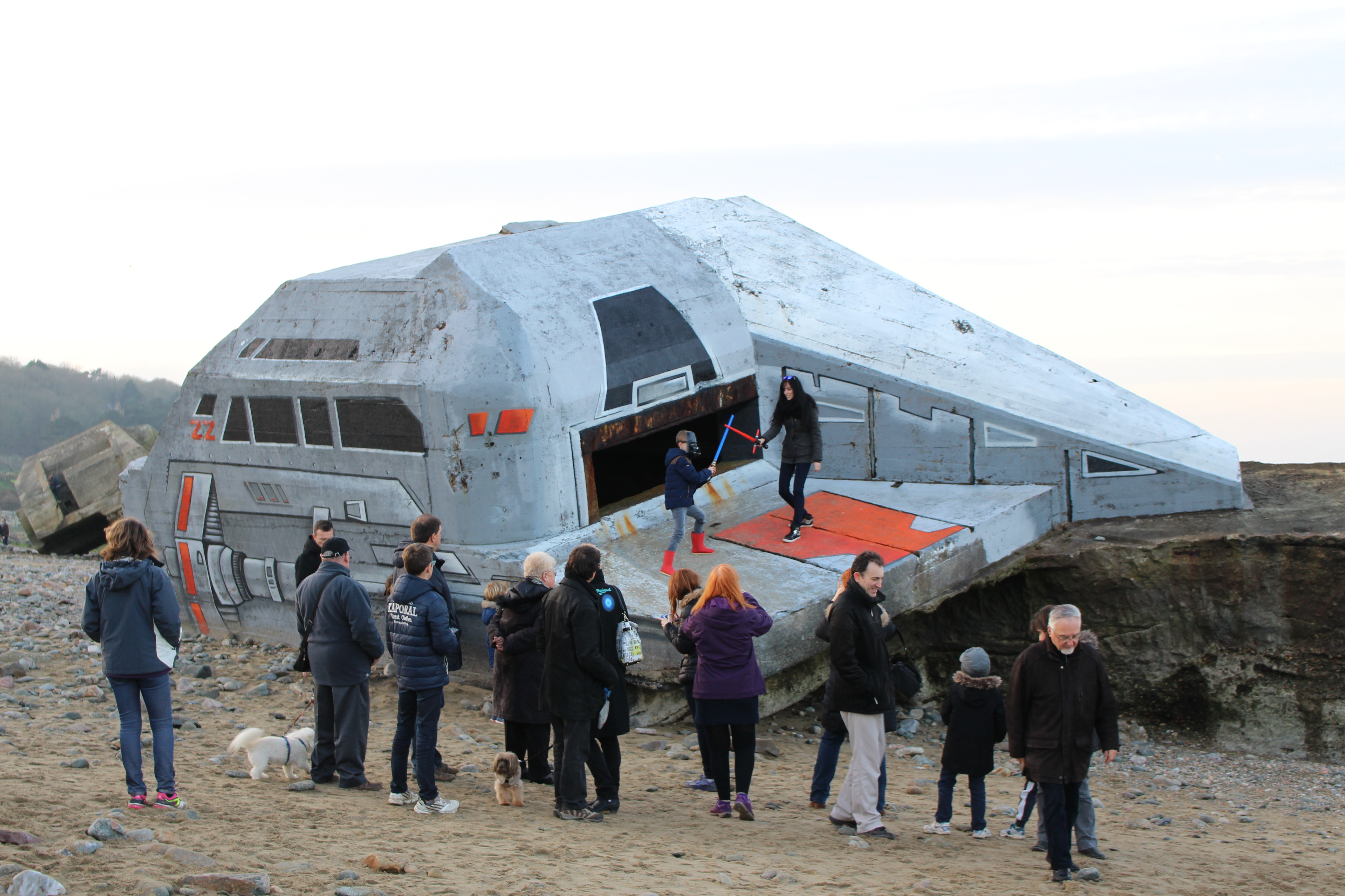 graph Star War par Baby K